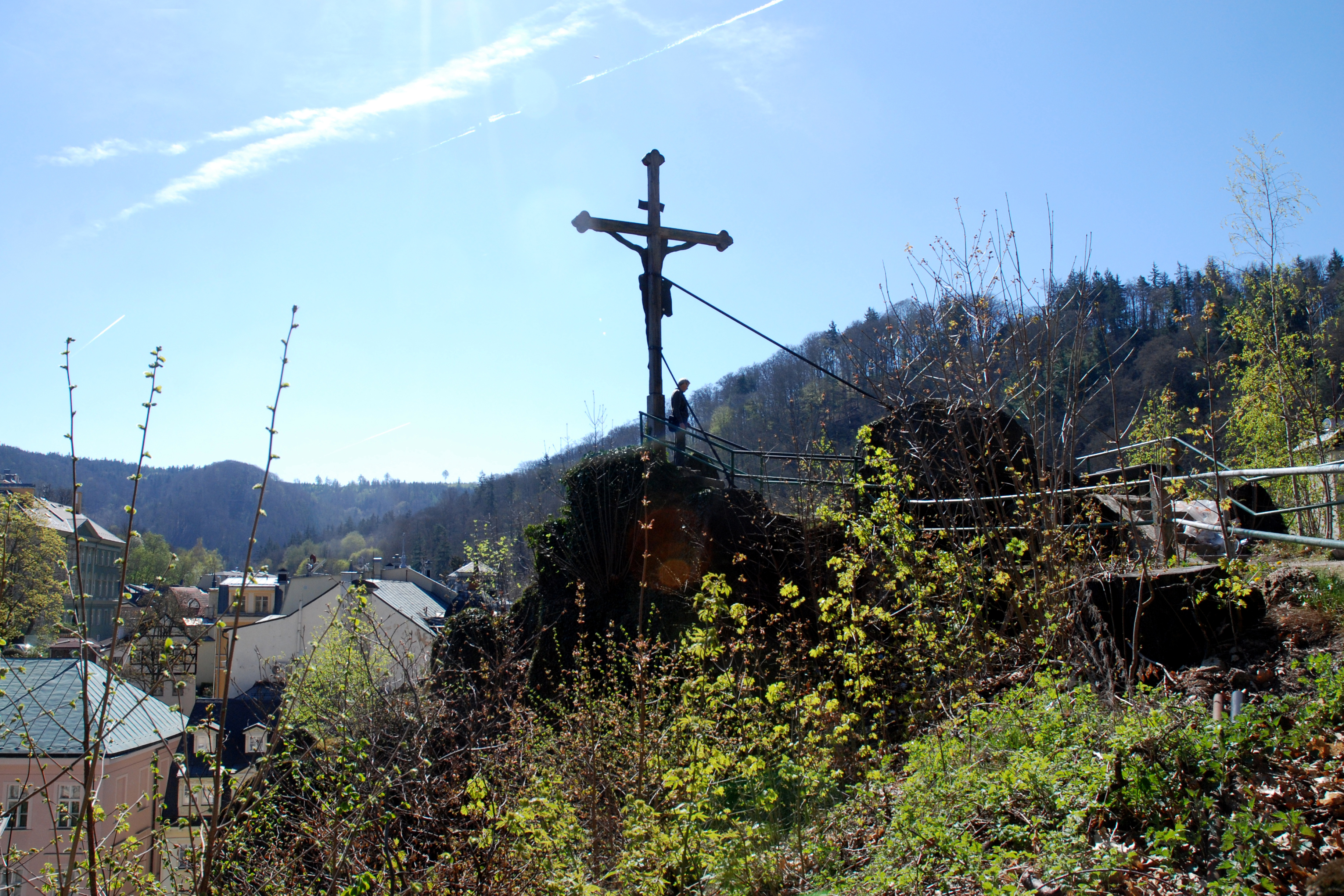 Keglewiczův kříž nad Grandhotelem Pupp v Karlových Varech